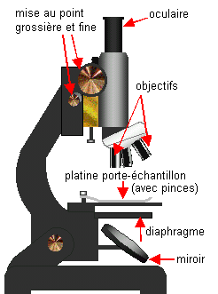 Schéma d'un microscope optique. Importé du wikipédia en langue anglaise. Dessiné par Theresa Knott, contributrice du wiki anglais, le 27 mars 2003 à 15h43 (UTC), avec l'outil de dessin de Microsoft Word et Paint Shop Pro. Corrigé par Héron avec Paint Shop Pro. Traduit en français par Cdang 22 jan 2004 à 16:44 (CET) avec Paint Shop Pro.